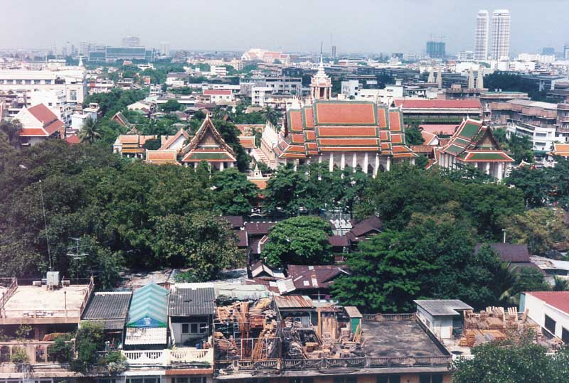 Bangkok Overview